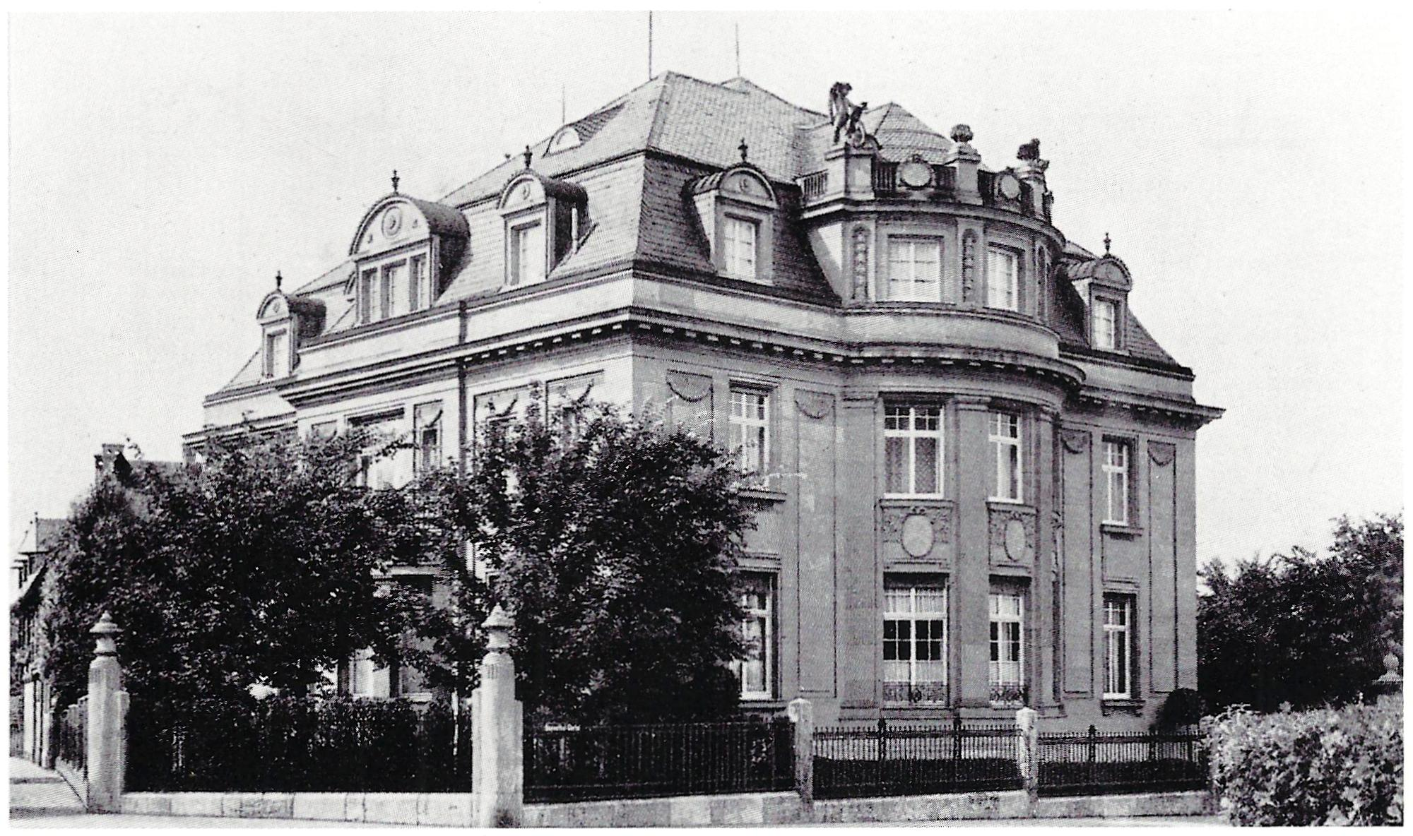 Haus Opfergelt, Bayenthalgürtel 4, Köln-Marienburg